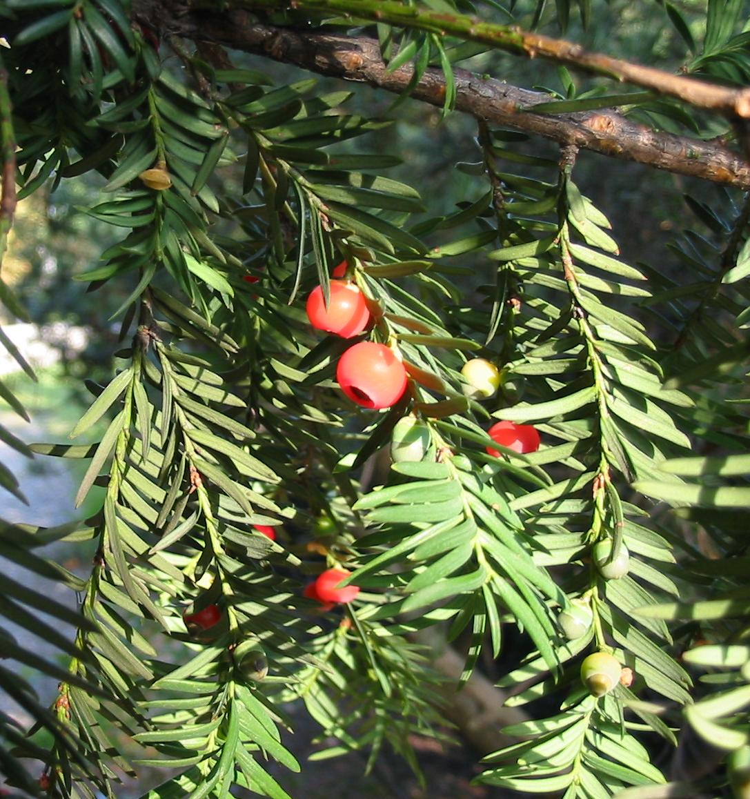 Cis, Taxus baccata, (c) 2004 Krzysztof P. Jasiutowicz